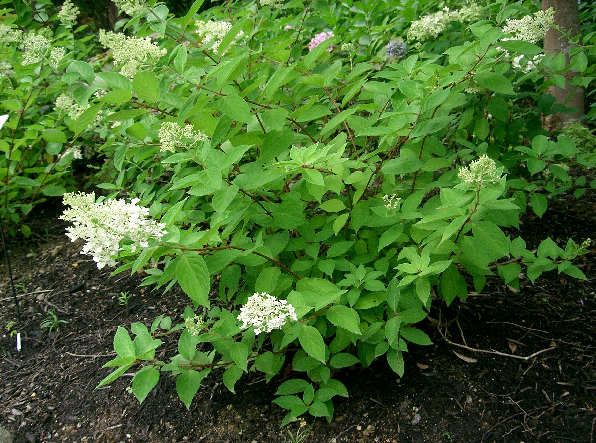 Hydrangea paniculata f. grandiflora